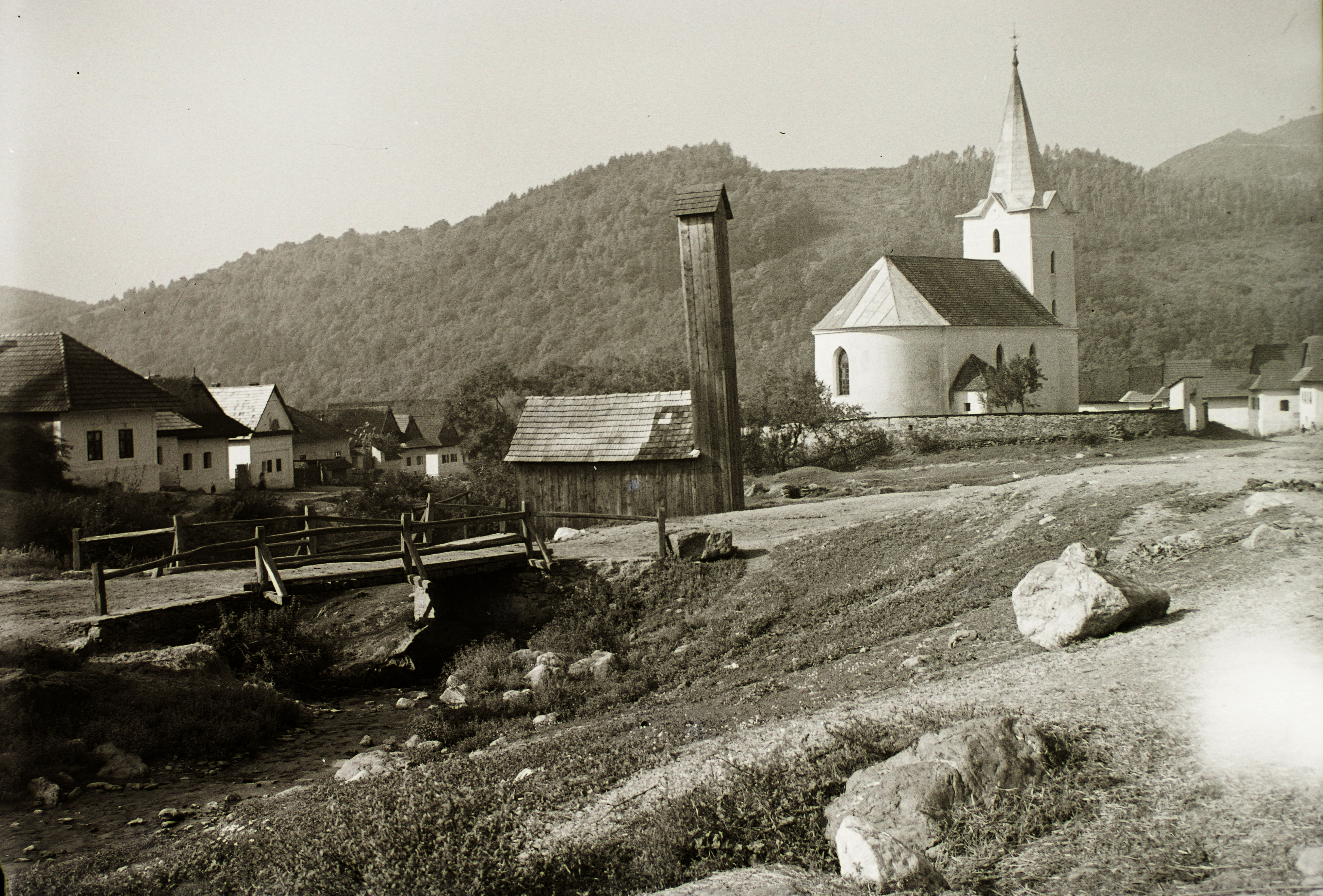 erődfallal körülvett evangélikus templom. Location: Slovakia, Vlachovo Tags: Czechoslovakia, fortified church, church Title: erődfallal körülvett evangélikus templom.